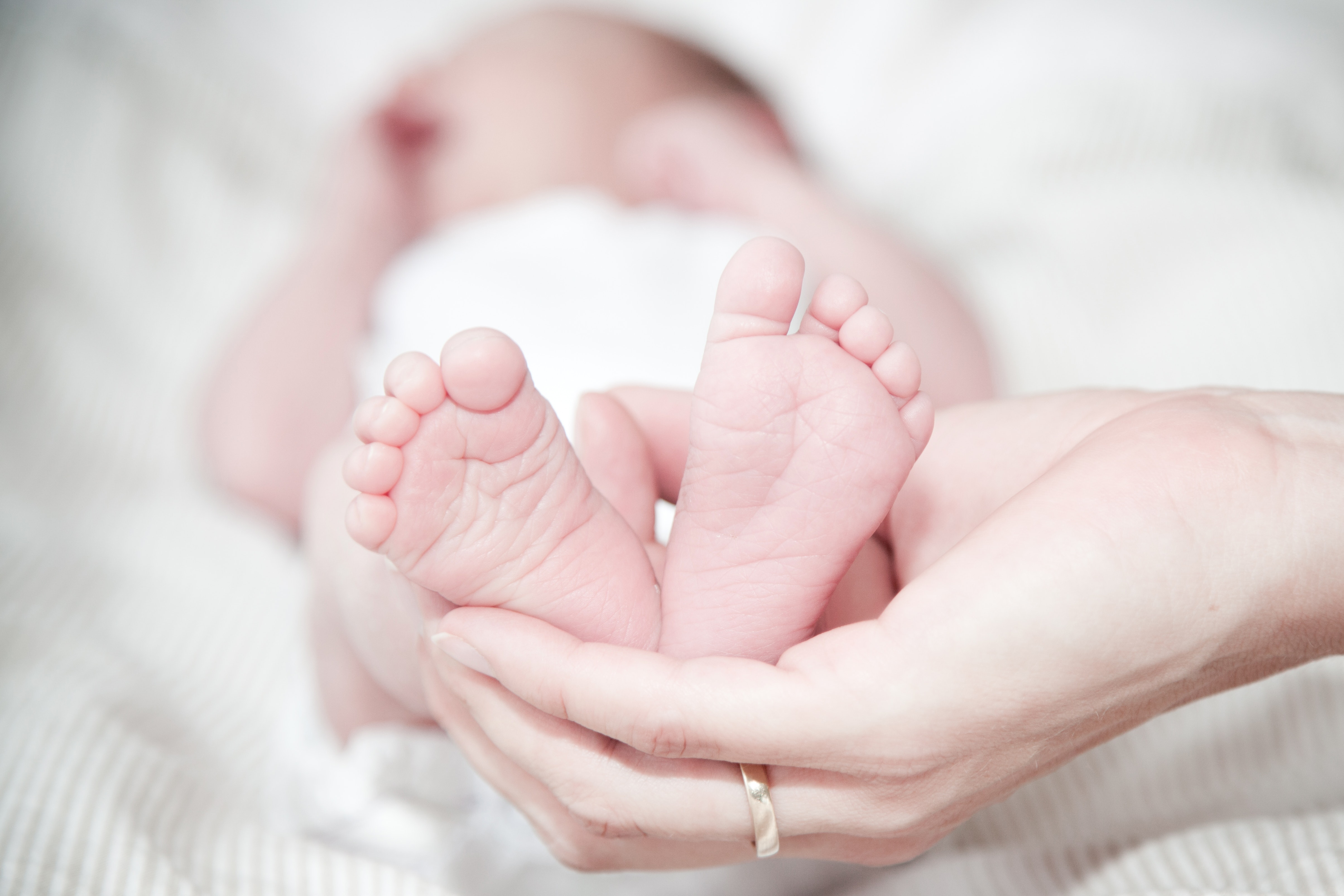 Nemojte trljati kožu već ju nježno osušite tapkanjem